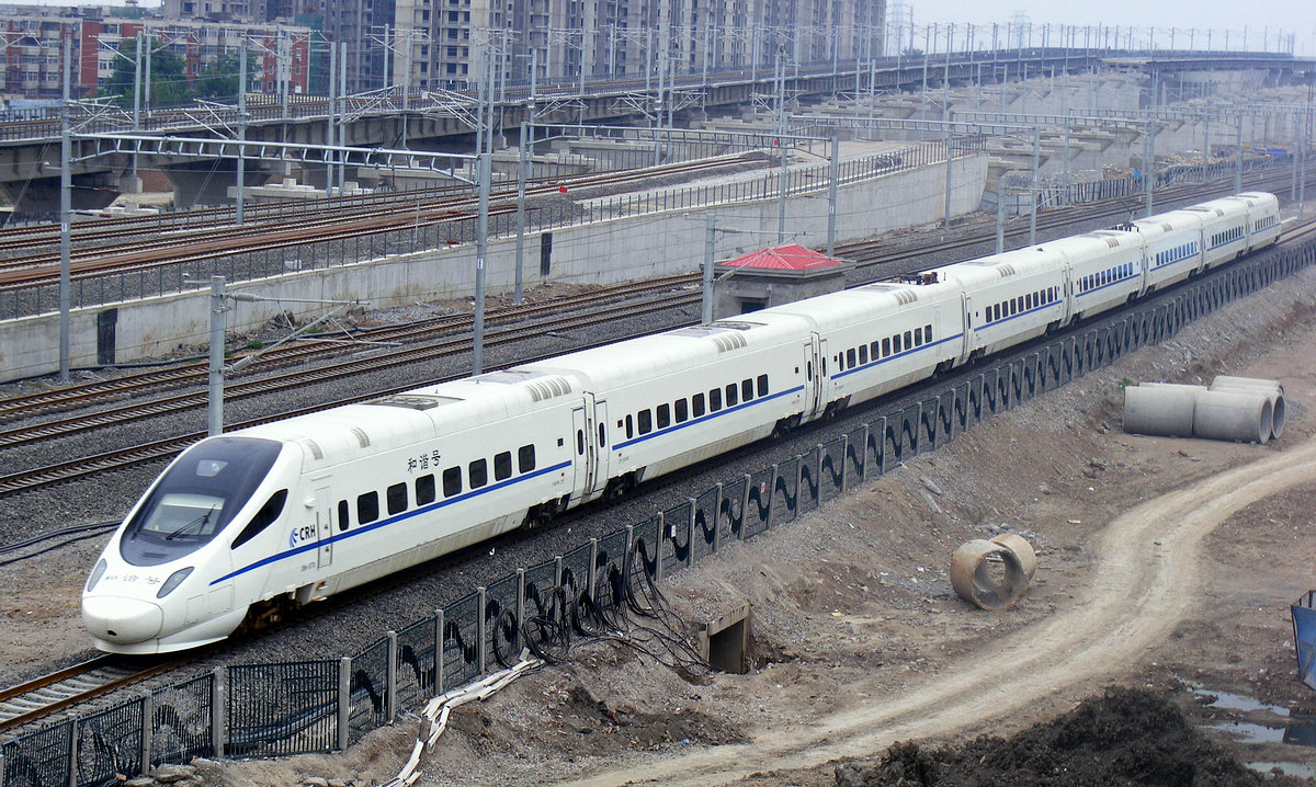 中文（中国大陆）: CRH5A--京沪普速线